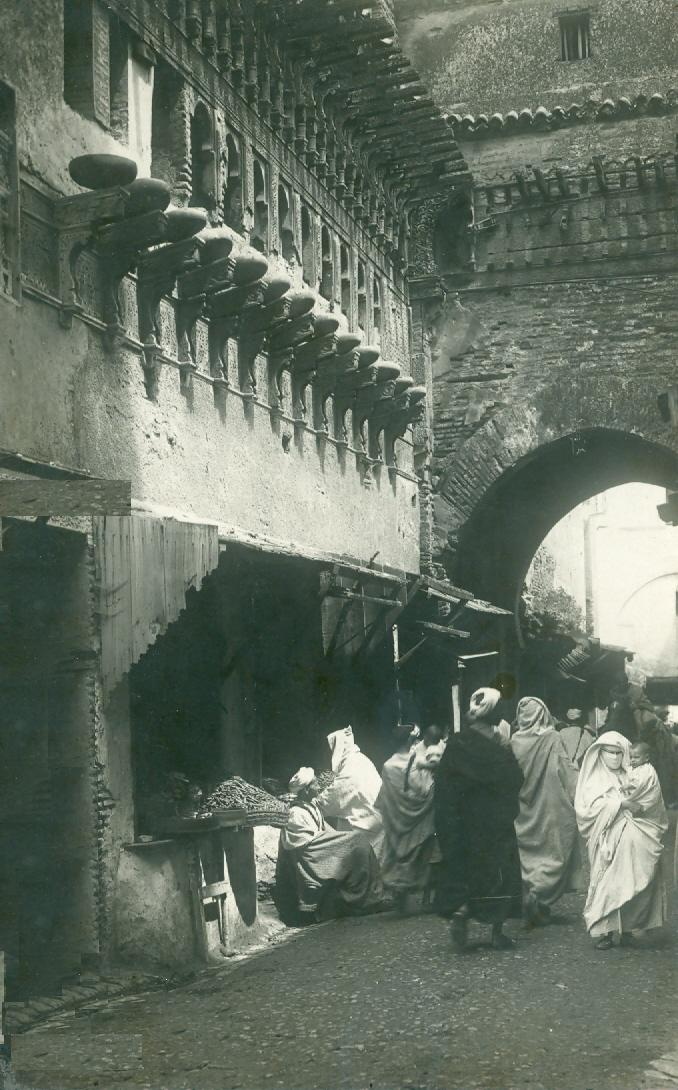 l'horloge monumentale de Fès la Magana BouInania, vue de la fin 19ème siècle